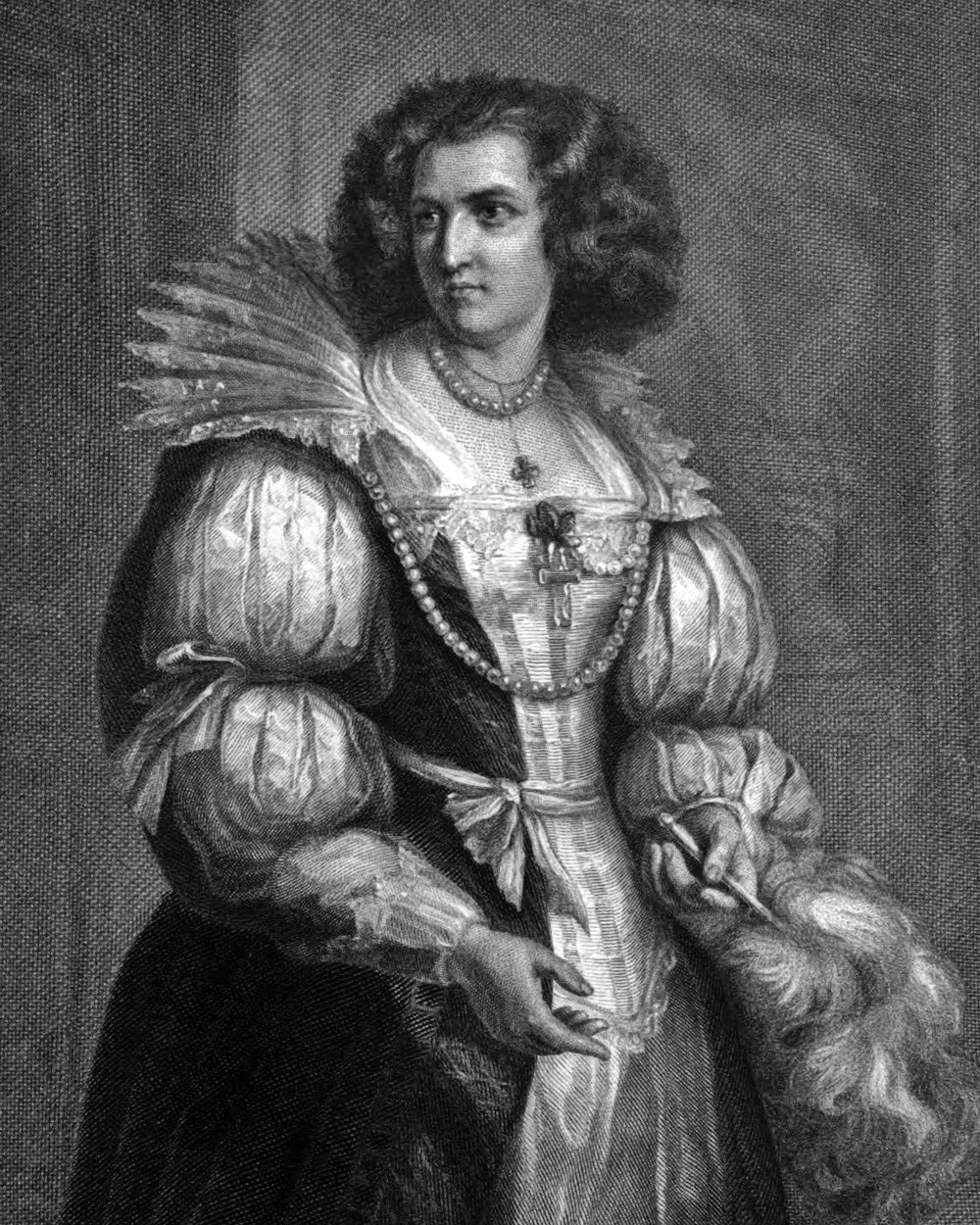 Gräfin Terzky aus Friedrich Schillers Dramen-Trilogie Wallenstein, als Stahlstich gestochen um 1859 nach einer Zeichnung von Friedrich Pecht